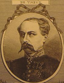 Les membres du gouvernement belge